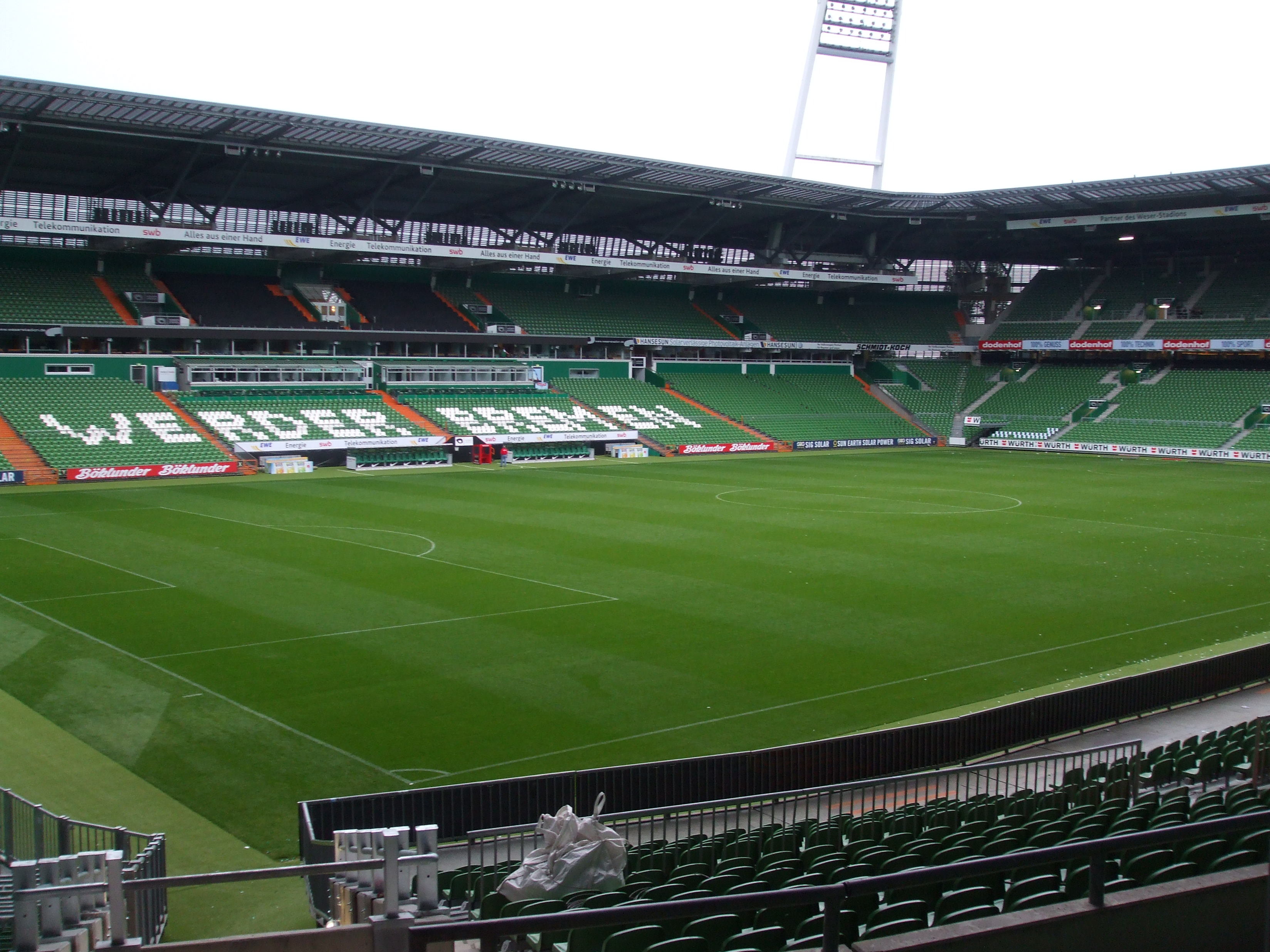 Imagen del Weserstadion, estadio del Werder Bremen